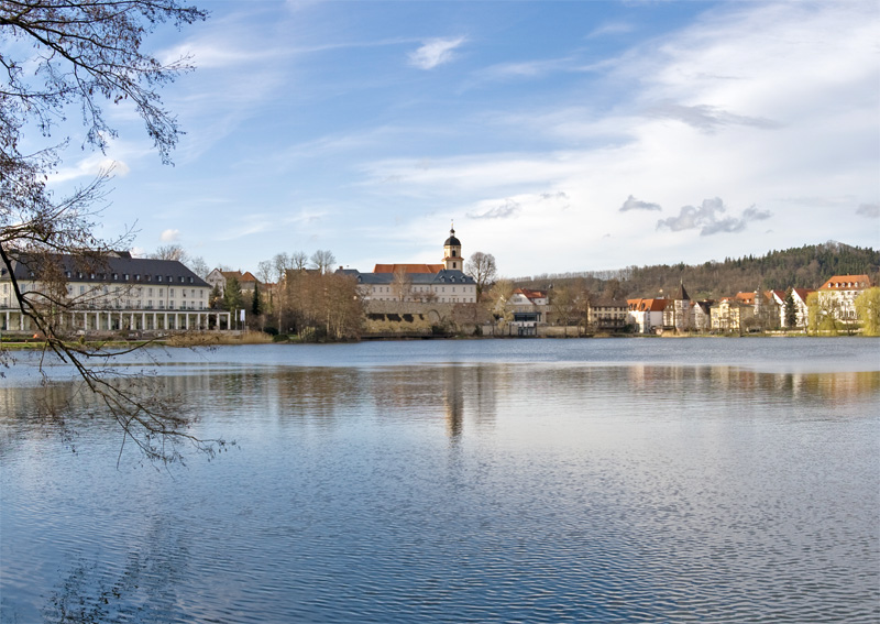 Burgsee Bad Salzungen